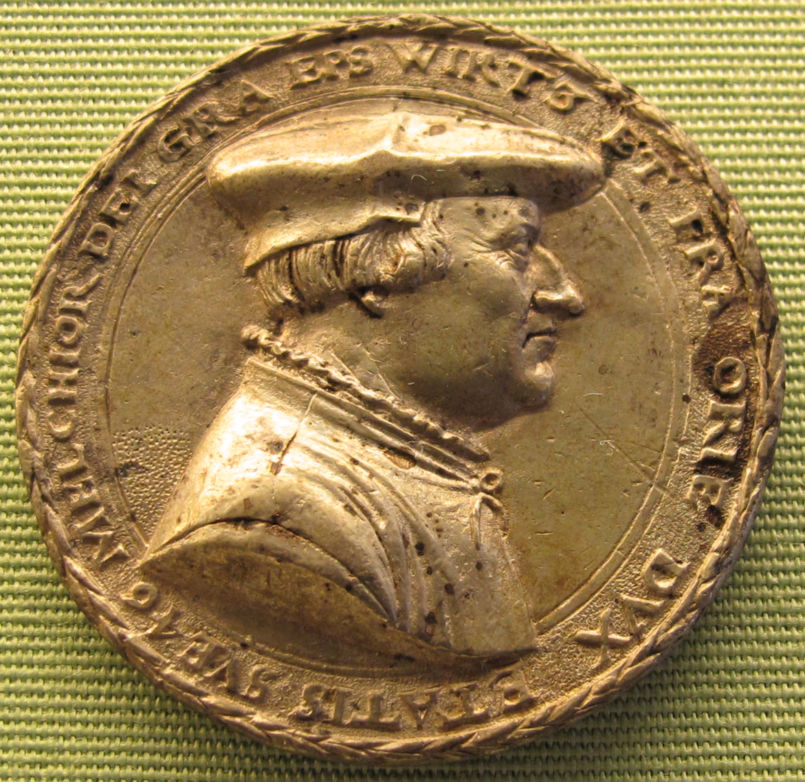 Melchior Zobel, vescovo di Wurzburg, 1551